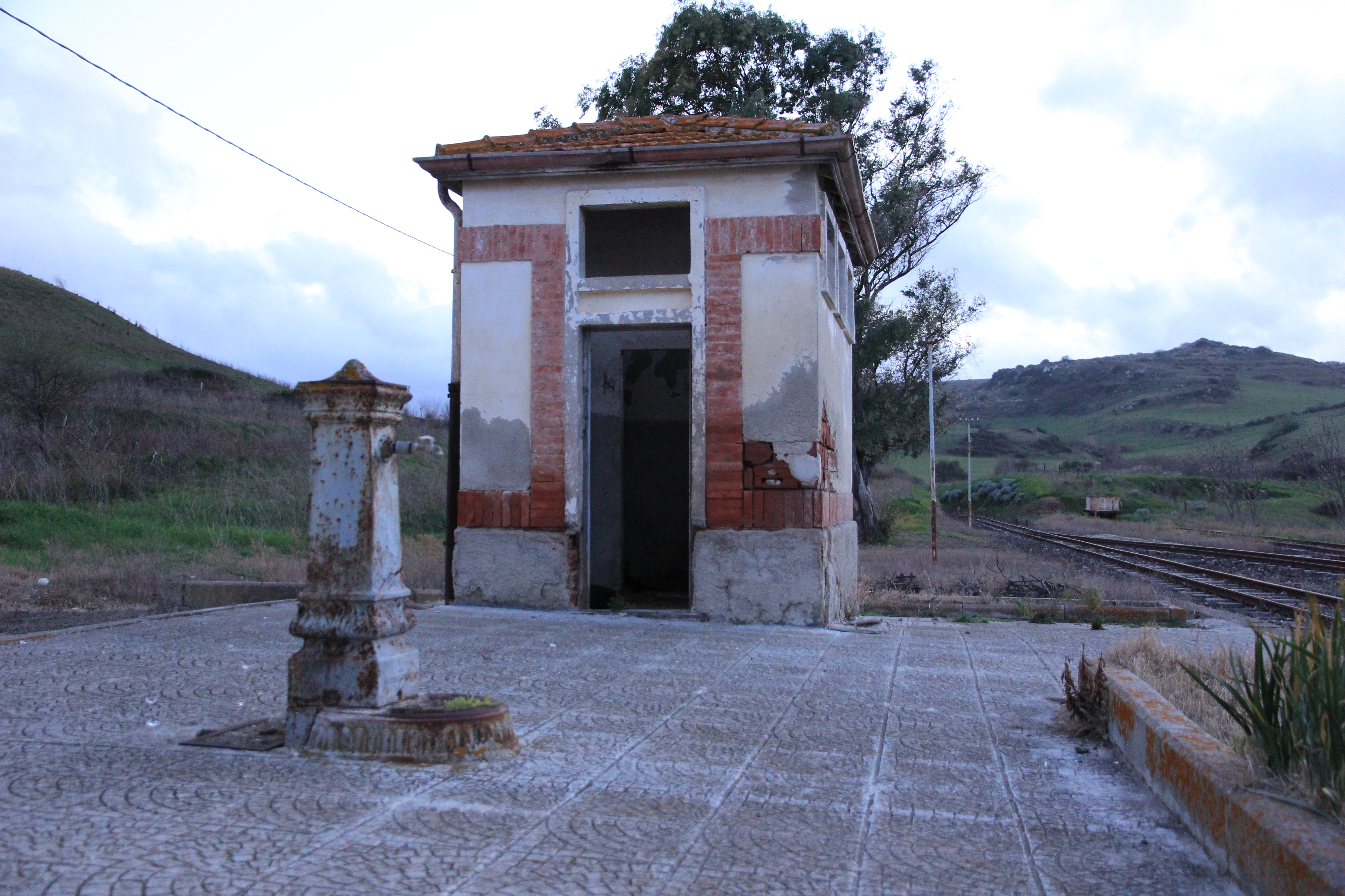 Martis - Stazione ferroviaria